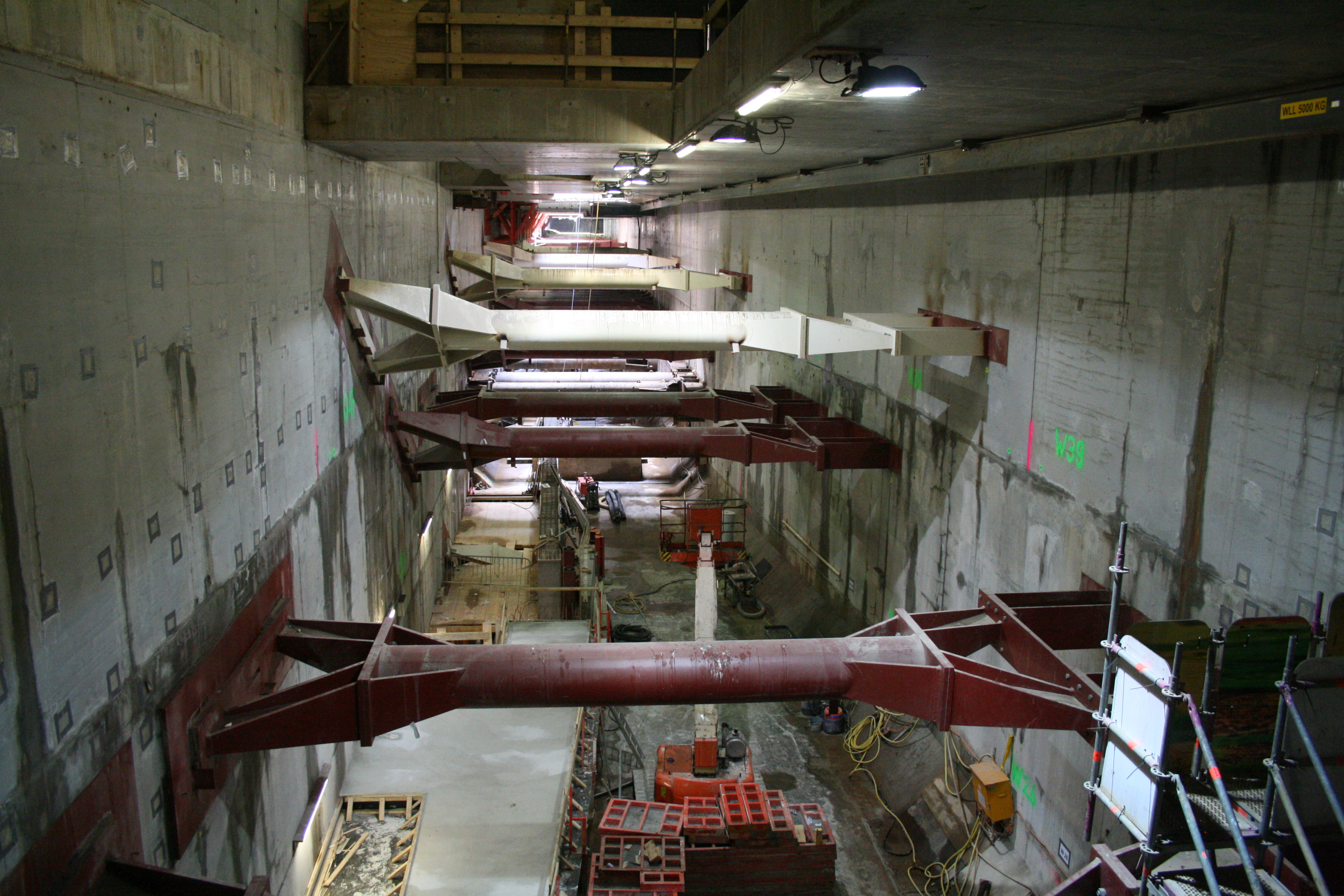 Station De Pijp, constructieve stempels tussen tunnelwanden.